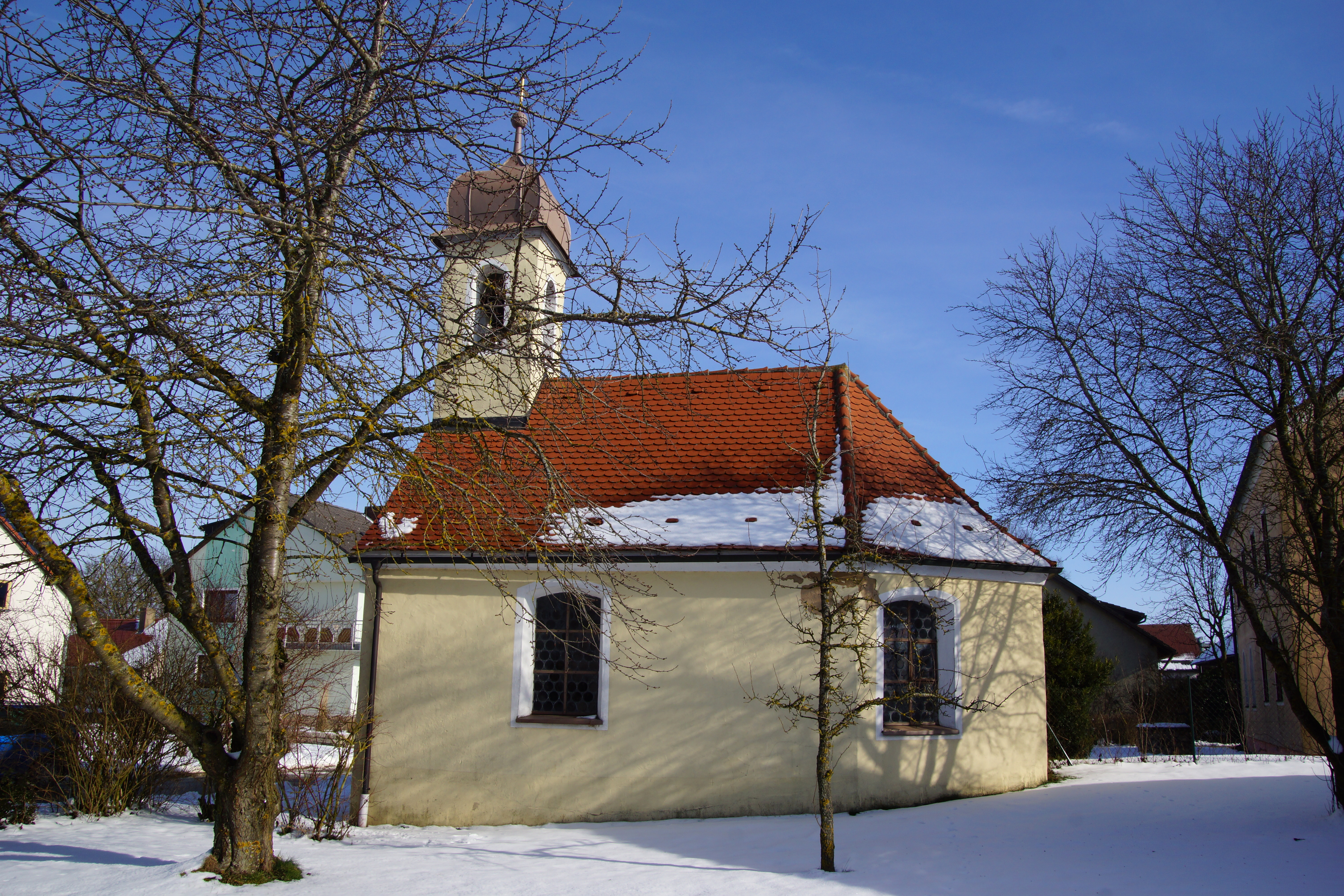 Die katholische Ortskapelle von Viehhausen bei Greding